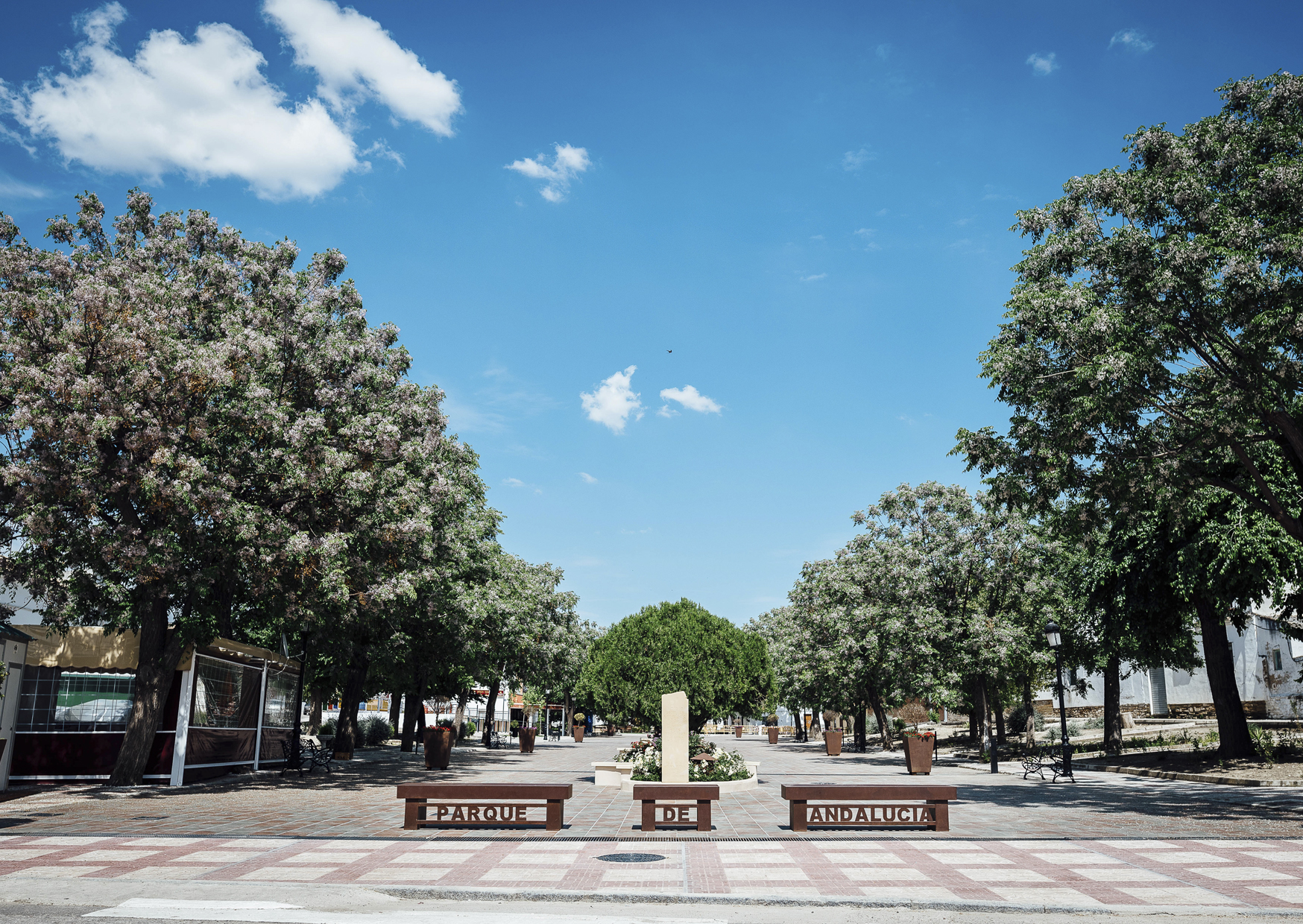 Fotografía Do-Vale